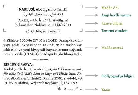 artkel